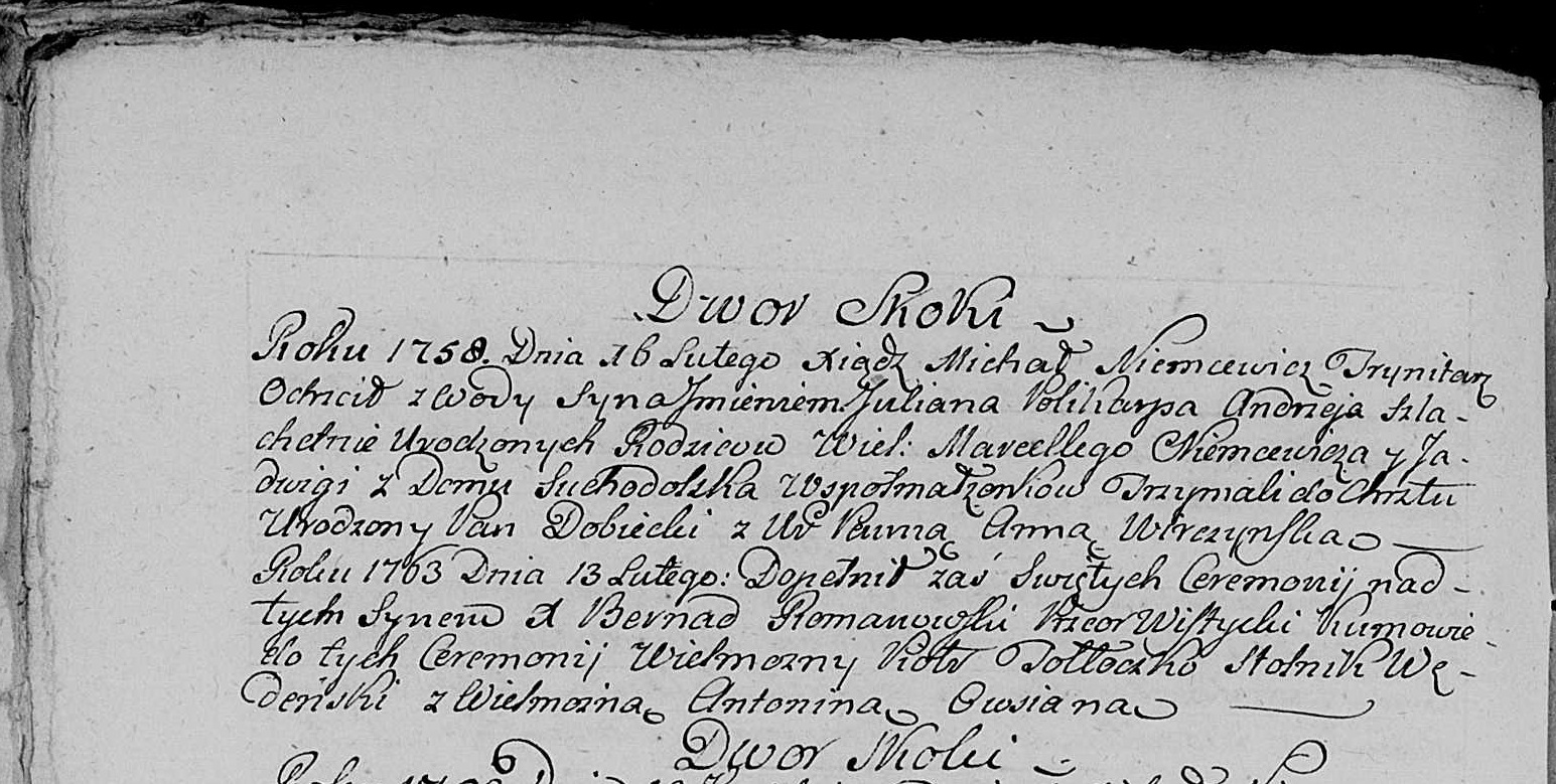 Akt Chrztu J.U.Niemcewicza z parafii Wistycze k. Brześcia - kopia w zbiorach Biblioteki Publicznej im. J. U. Niemcewicza w dz. Ursynów m. st. Warszawy.